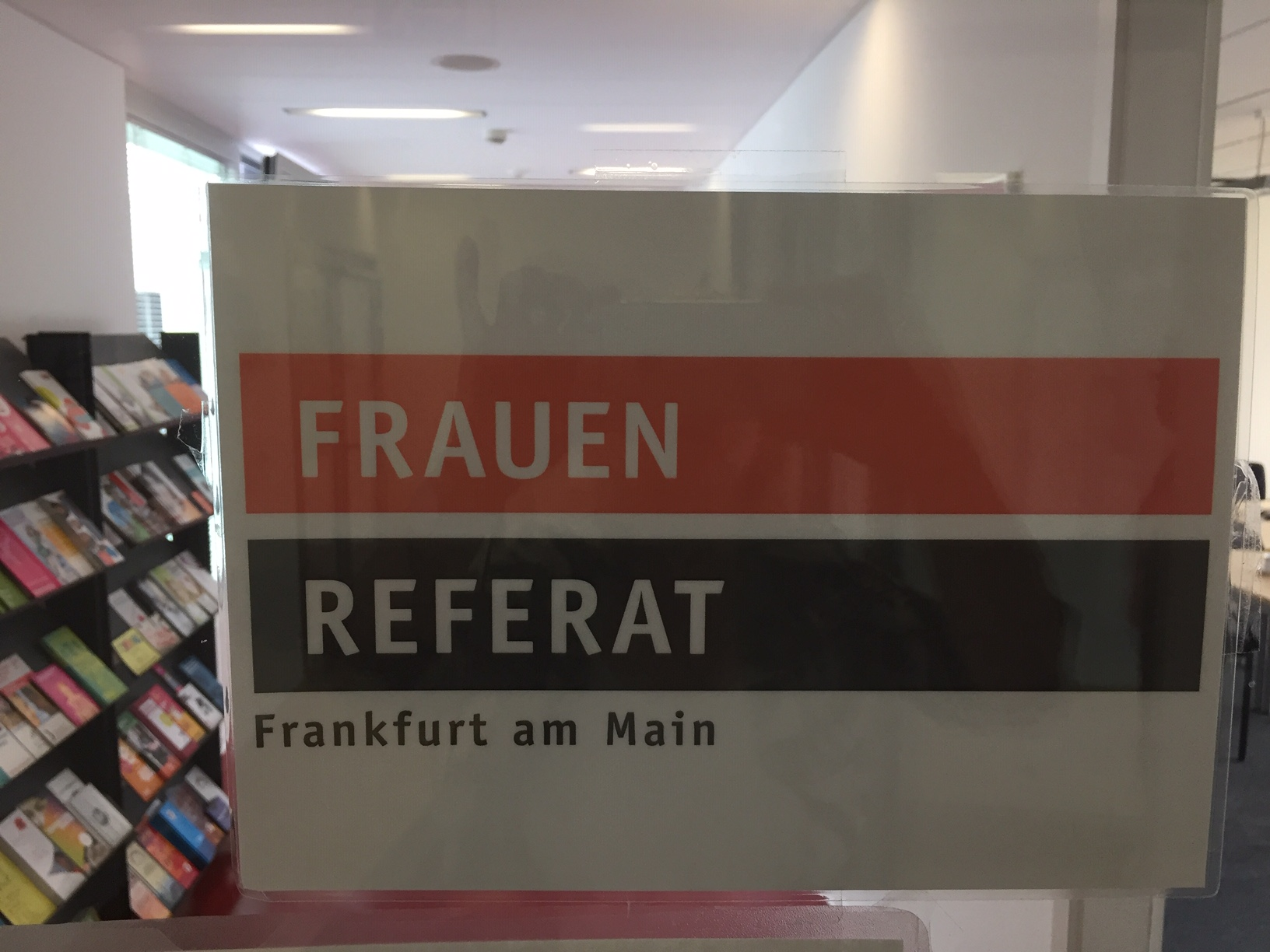 Eingang zum Büro des Frauenreferats der Stadt Frankfurt am Main.